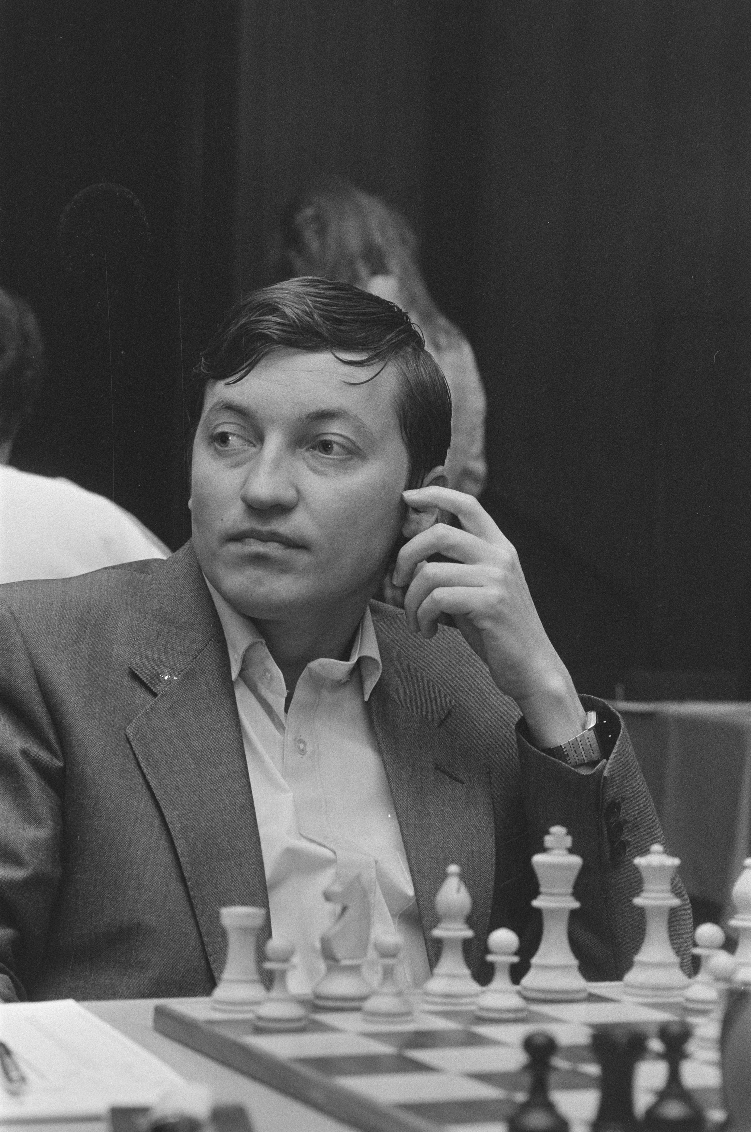 Collectie / Archief : Fotocollectie Anefo Reportage / Serie : [ onbekend ] Beschrijving : Ohra schaaktoernooi; Anatoli Karpov Datum : 17 juli 1985 Trefwoorden : schaken Persoonsnaam : Anatoli Karpov Instellingsnaam : OHRA Fotograaf : Vollebregt, Sjakkelien / Anefo Auteursrechthebbende : Nationaal Archief Materiaalsoort : Negatief (zwart/wit) Nummer archiefinventaris : bekijk toegang 2.24.01.05 Bestanddeelnummer : 933-3793